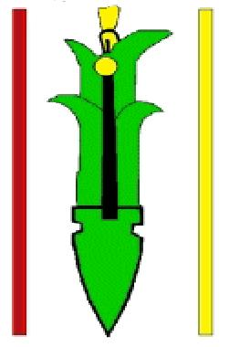 Escudo del municipio de Miacatlán, Morelos.